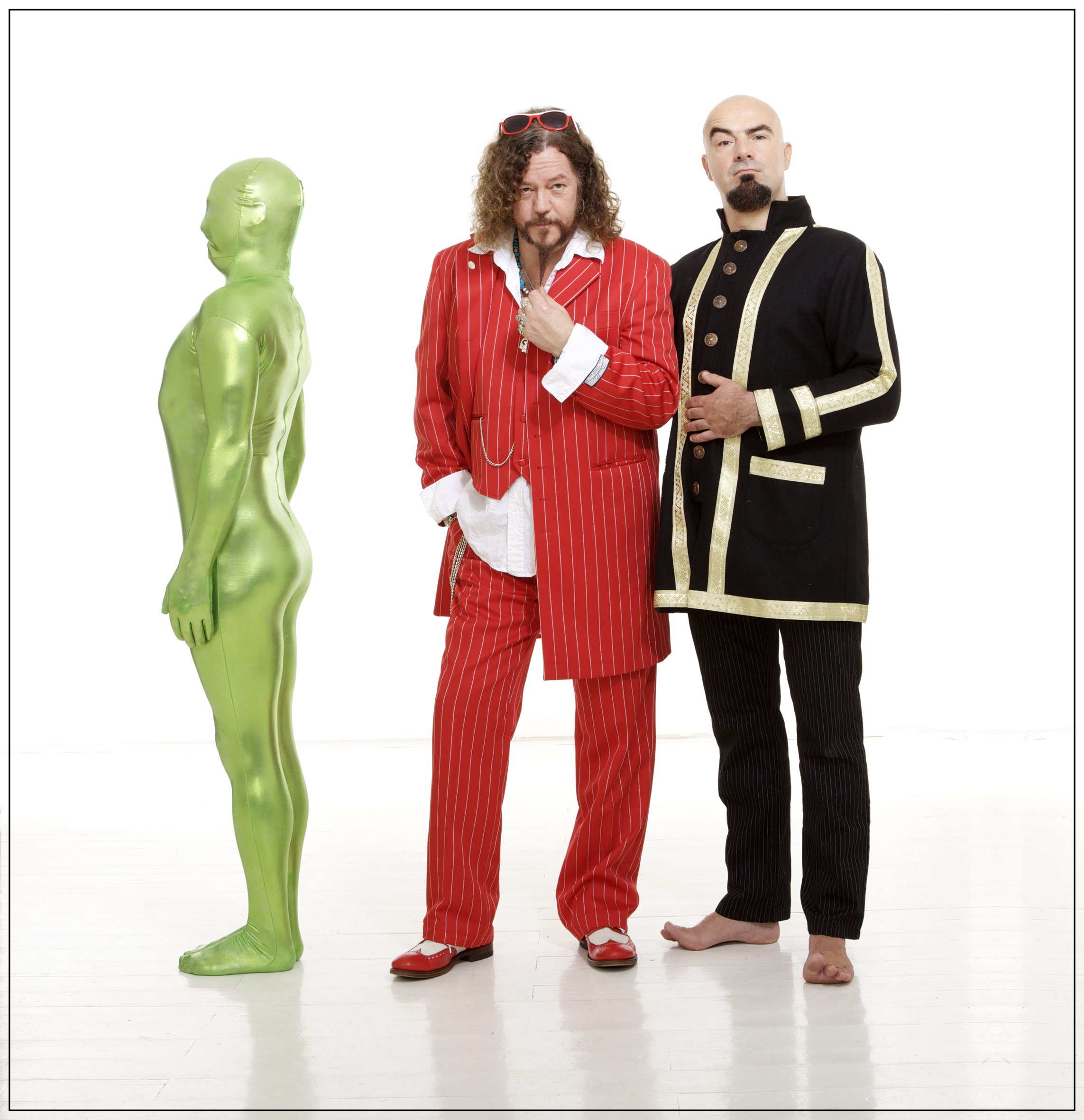 Knorkator 2011